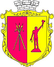 Сучасний герб м.Дніпродзержинськ